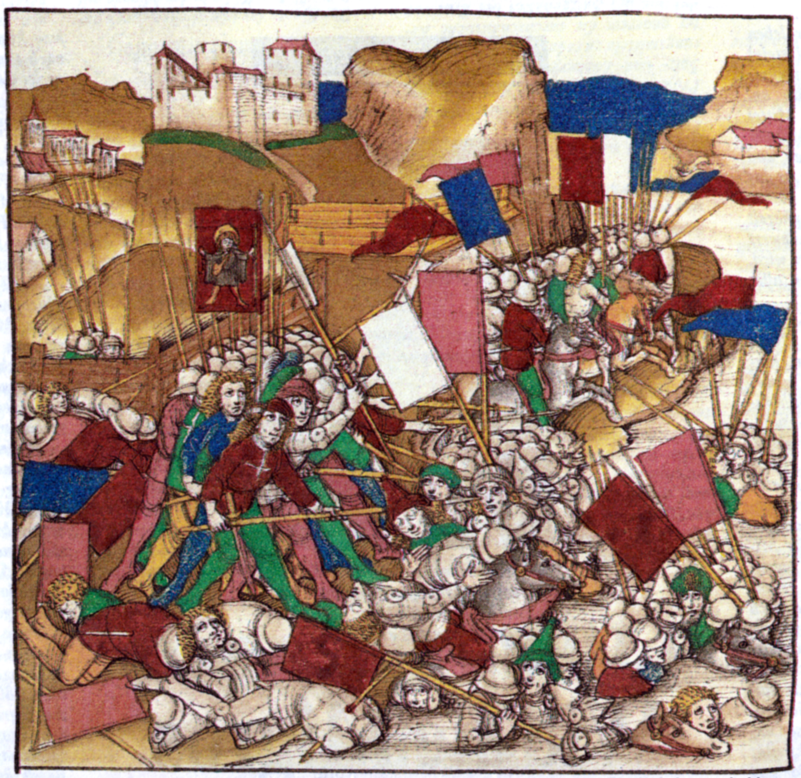 Darstellung der Schlacht bei Näfels am 9. April 1388 in der Spiezer Chronik. Unter dem Sturmlauf der Glarner bricht das habsburgische Heer auseinander, zahlreiche Kämpfer ertrinken im Fluss Linth.